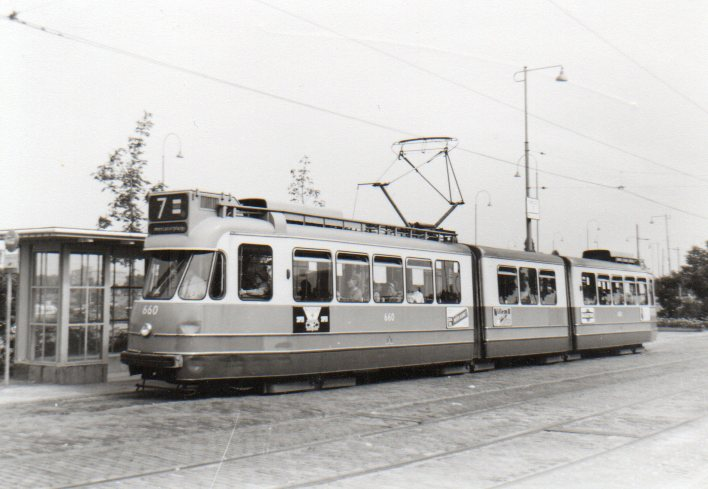 Amsterdamse gelede tram 660 (serie 5G, gebouwd door Werkspoor in 1964) bij het Amstelstation. Foto gemaakt in 1965.